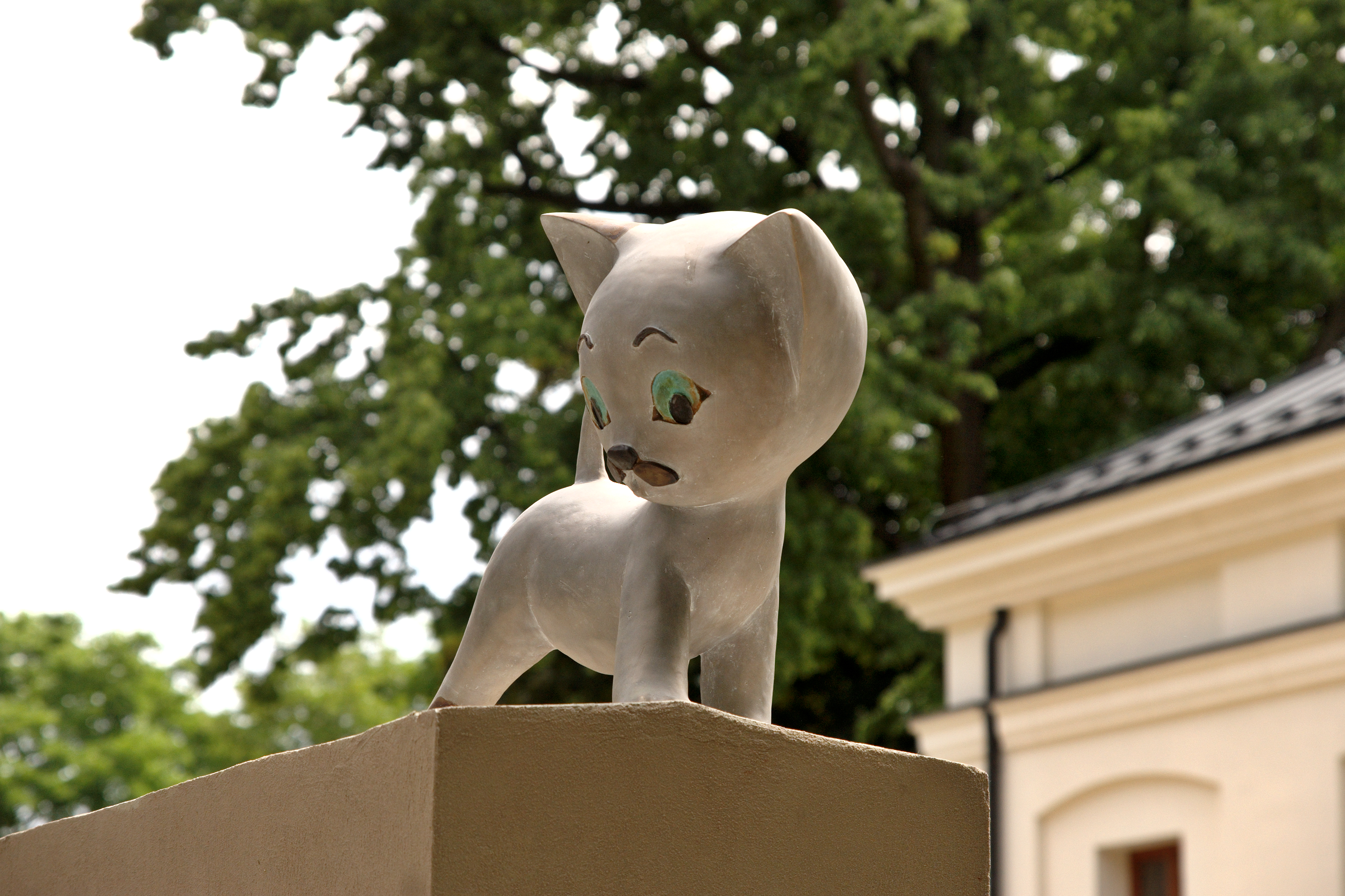 Kot Filemon, Bajkowa Łódź, Muzeum Kinematografii, Łódź